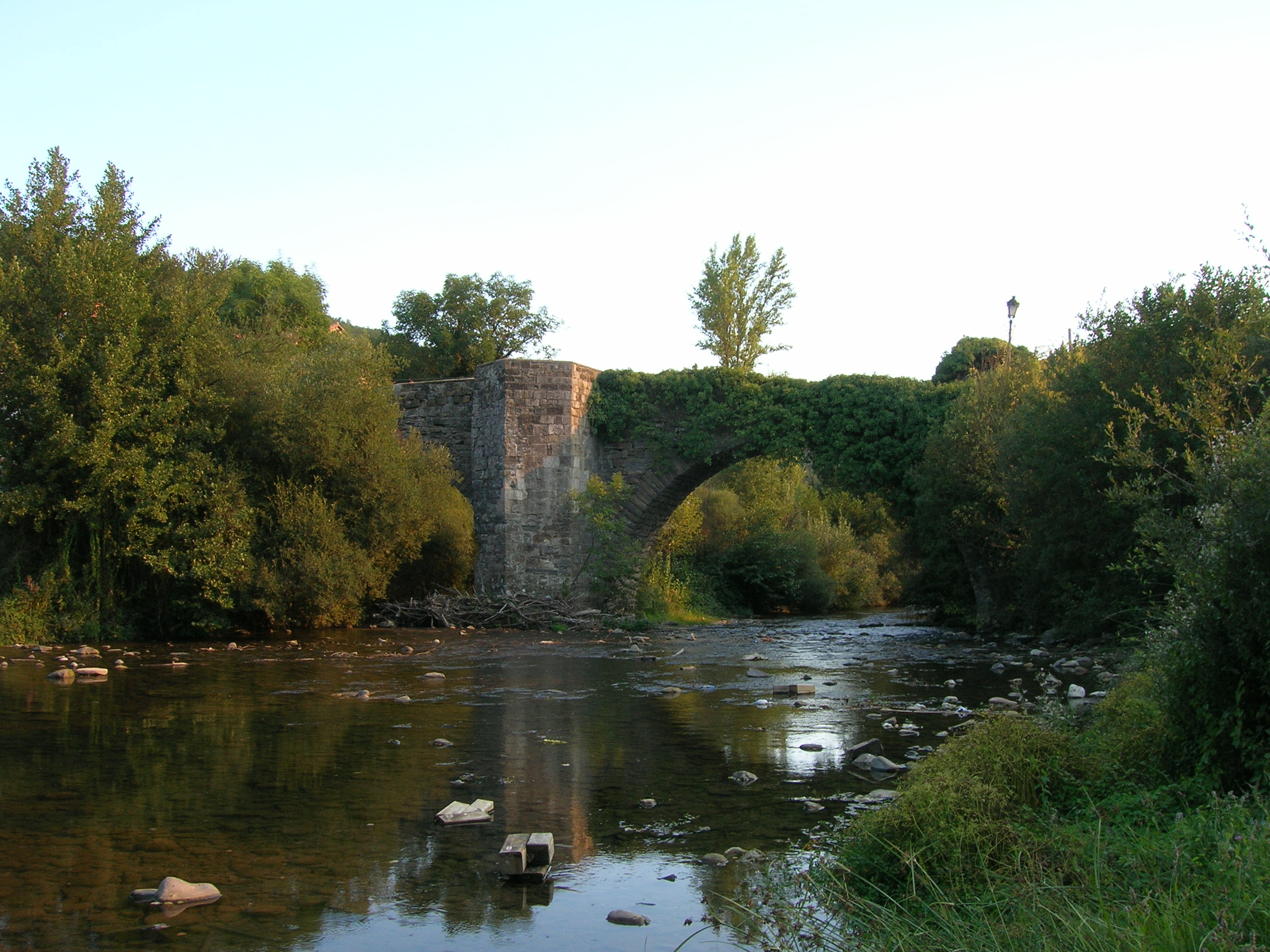 Puente gótico sobre el río Arga en la localidad de Zubiri.